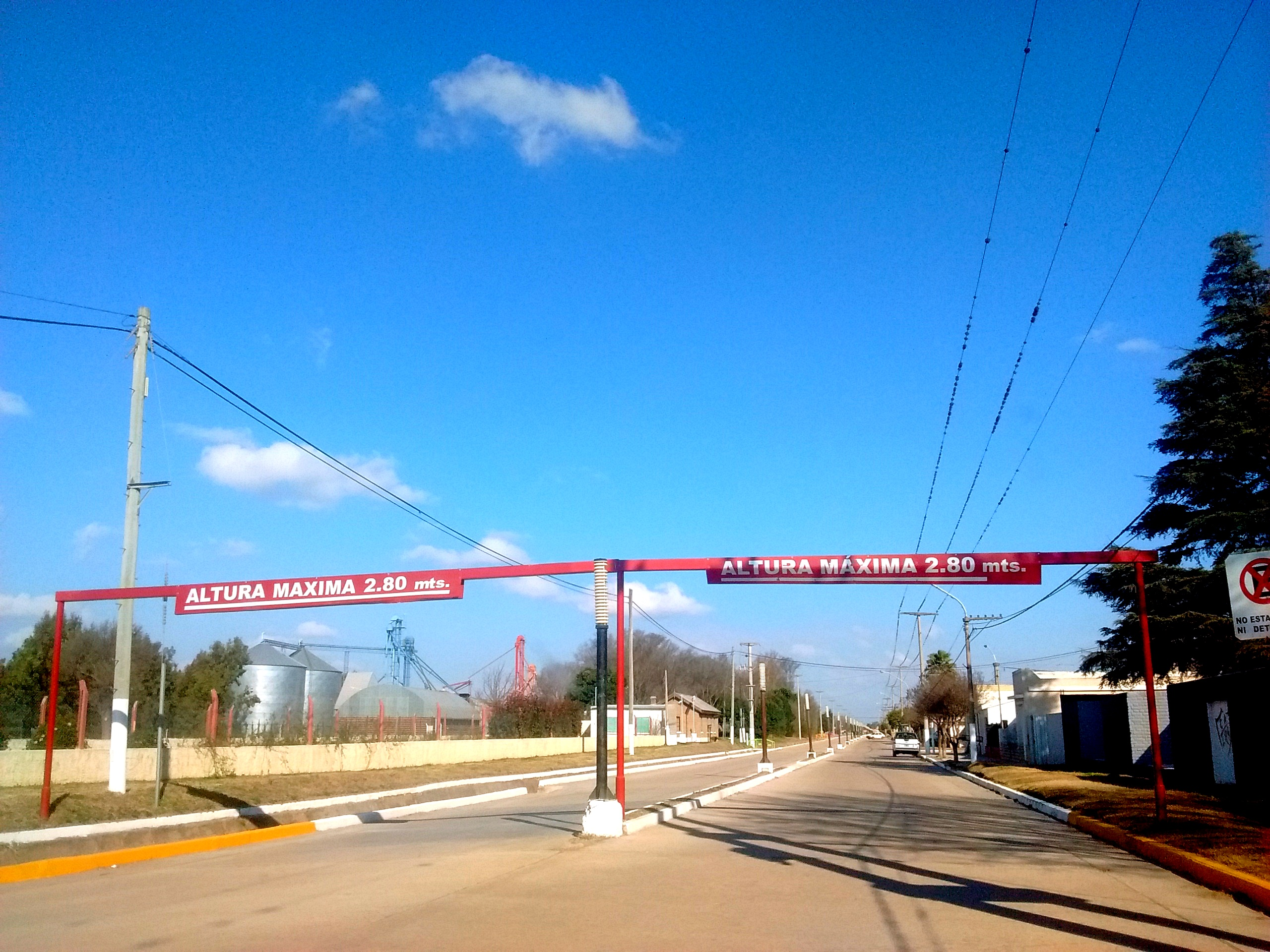 Avenida principal del poblado de Elena.